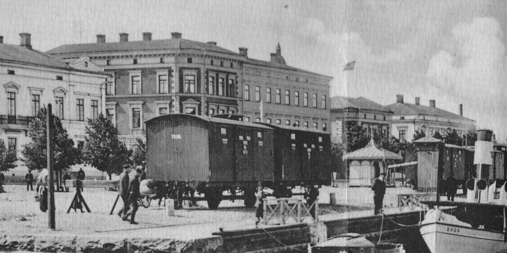 Historian havinaa Porin Etelärannasta eli paikasta missä nykyään kesäisin on mm. Jazzkatu